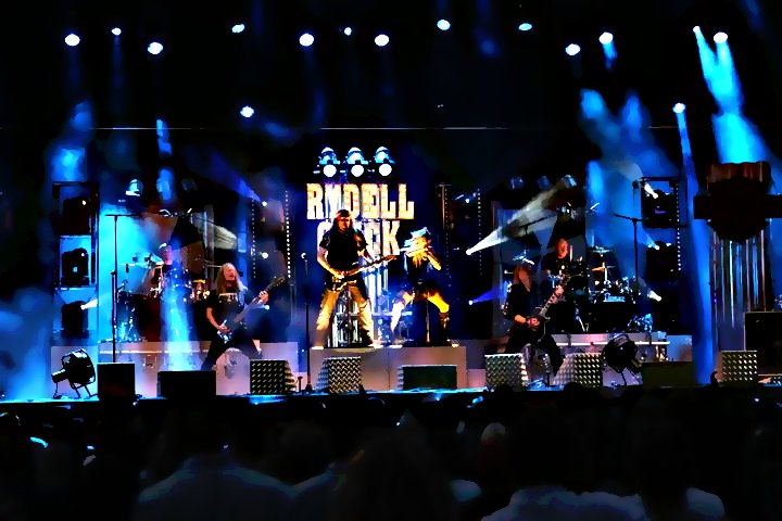 Rydell & Quick live på scen